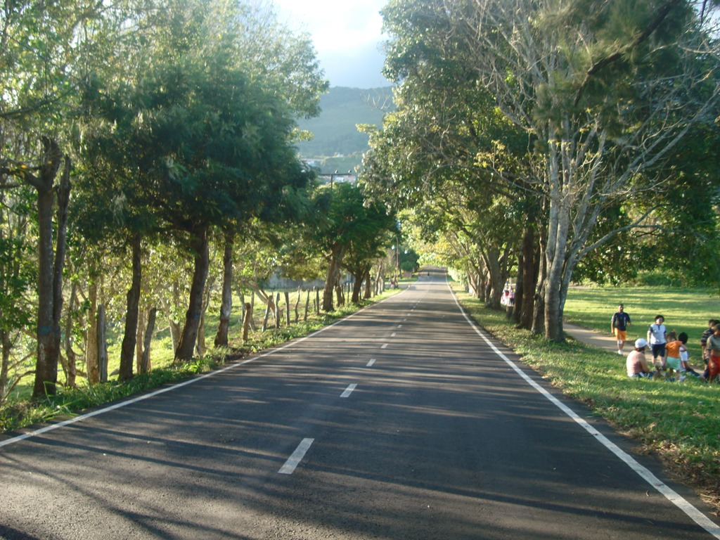 Otra vista del Seminario, con la gente que disfruta de su calidez. Palmira, estado Táchira.